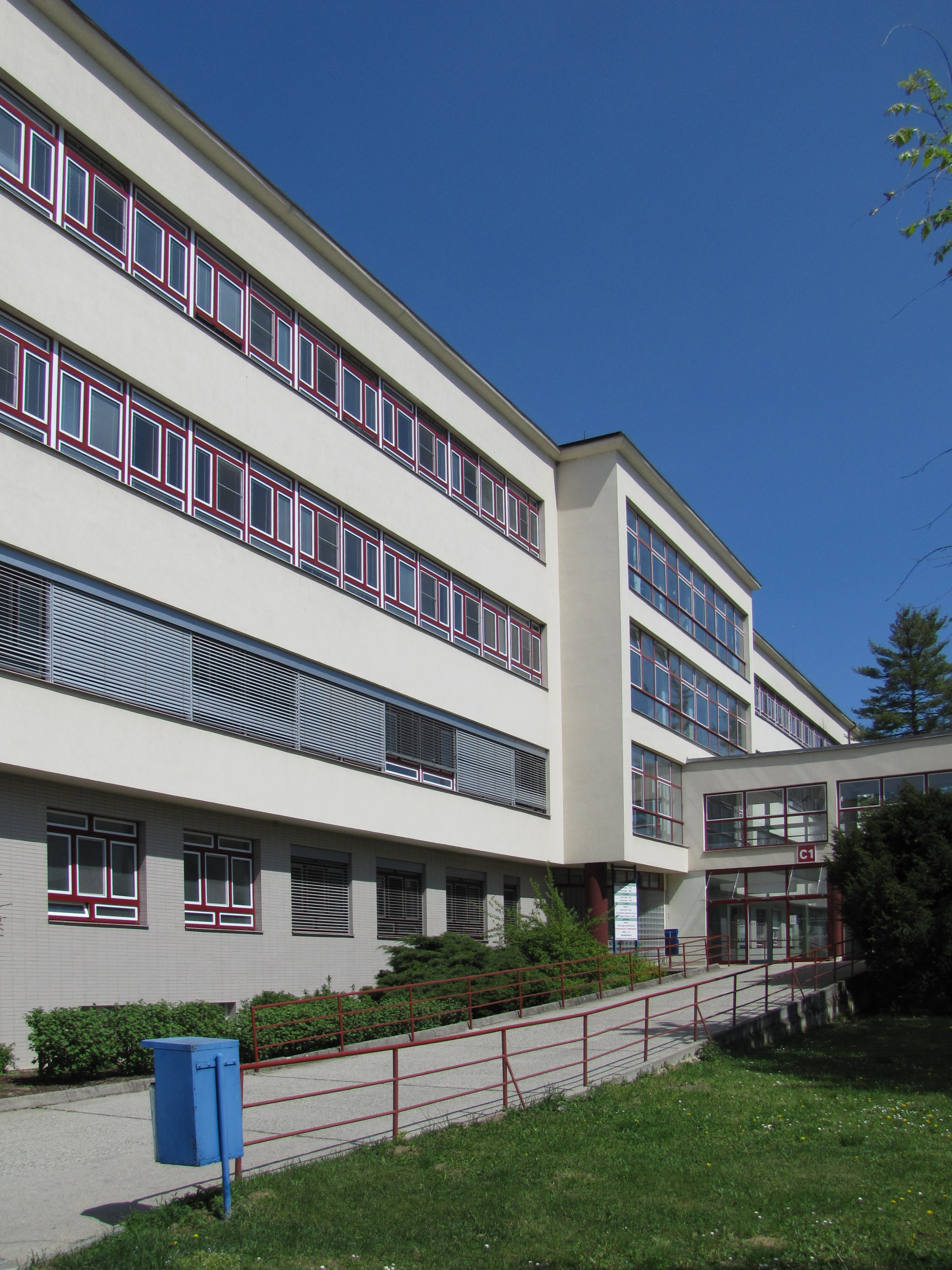 Nemocnice Kyjov, chirurgický pavilon